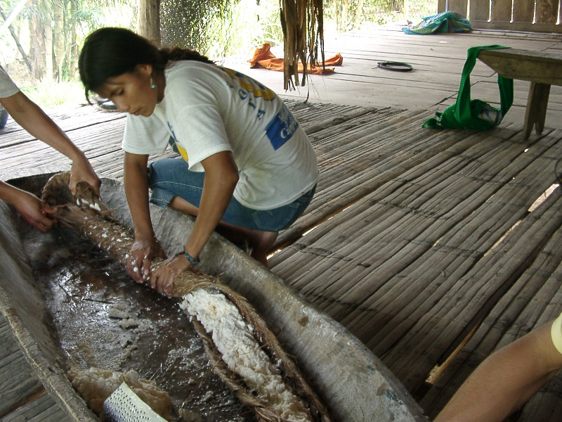 Ecuador Lago Agrio Herstellung von Maniok Mehl